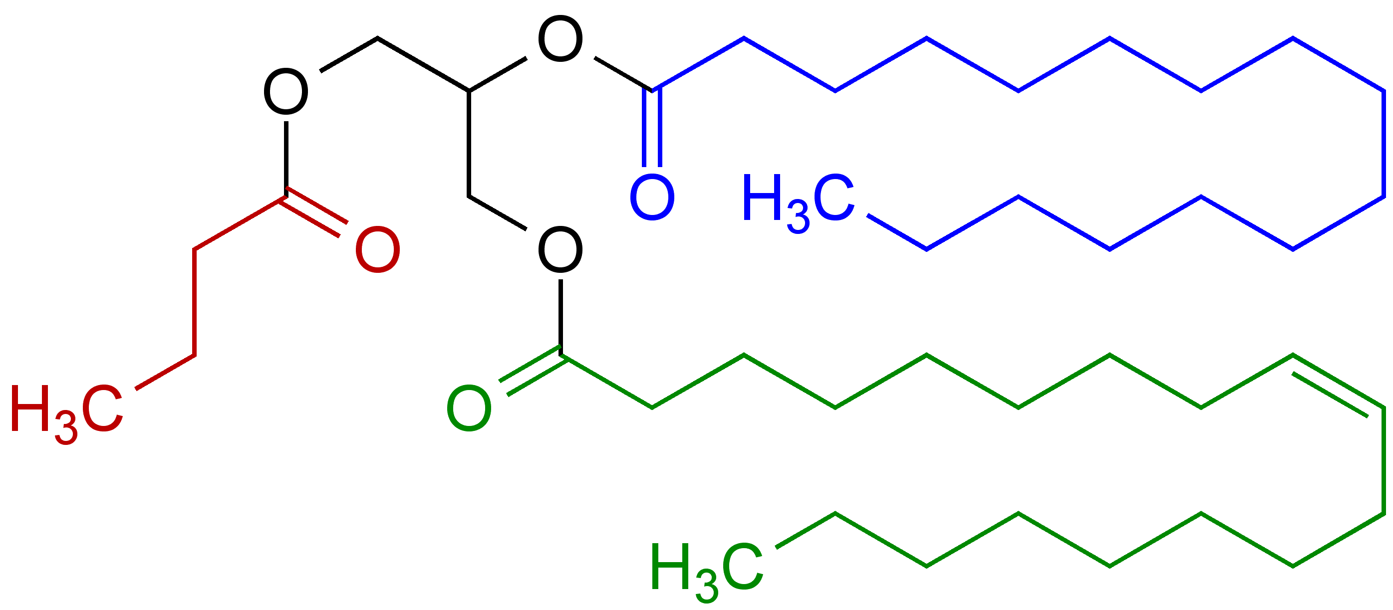 Typisches Triglycerid im Milchfett und in Butter gebildet aus Glycerin und den folgenden Fettsäuren: Buttersäure (rot), Palmitinsäure (blau) und Ölsäure (rot)